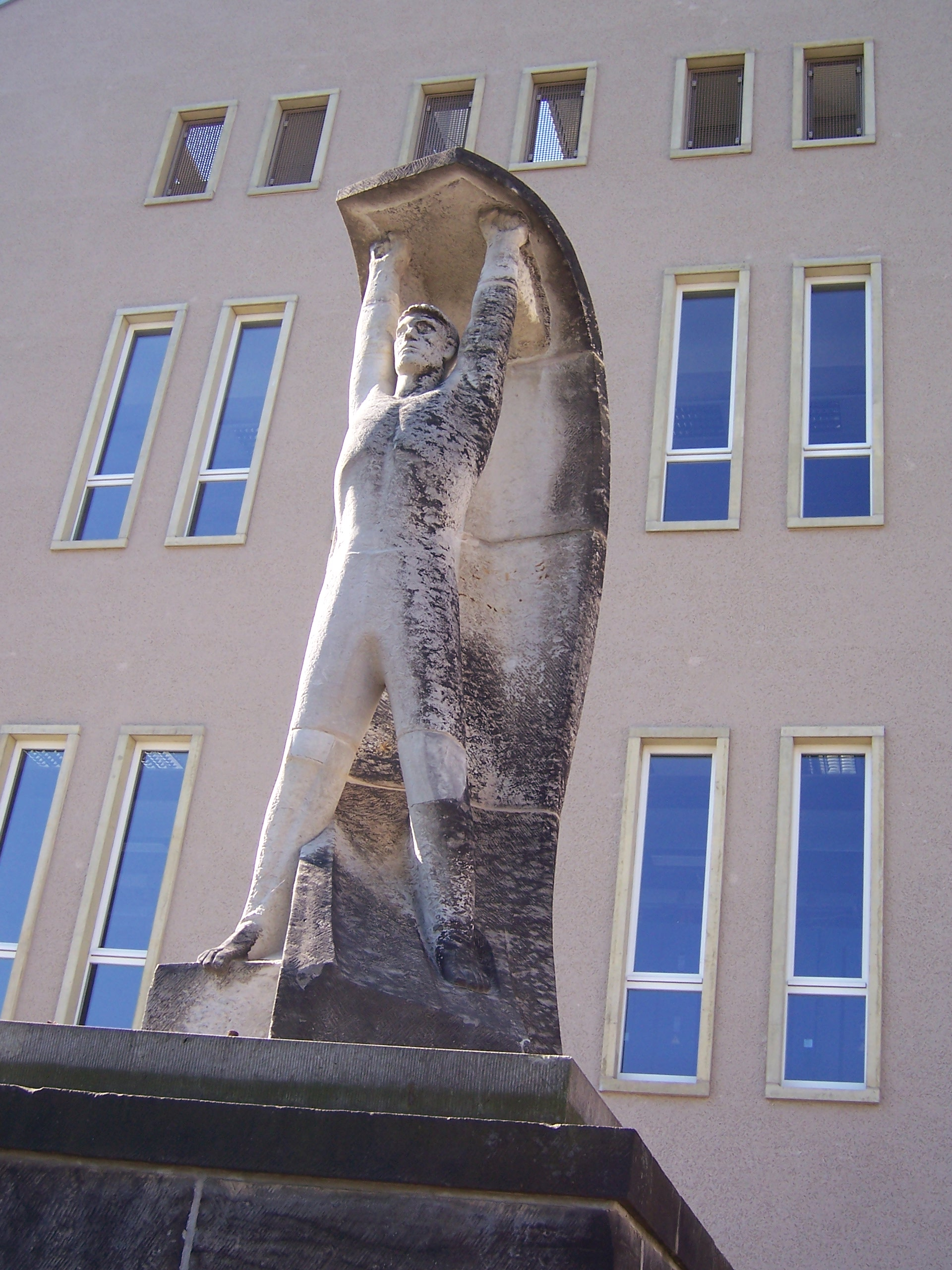 Statue vor dem Trefftz-Bau der TU Dresden